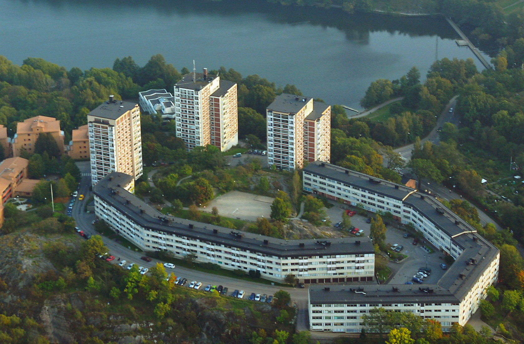 Fastighterna Ljuskronan och Ljussaxen vid Trekanten i Gröndal, arkitekt Bertil Karlén